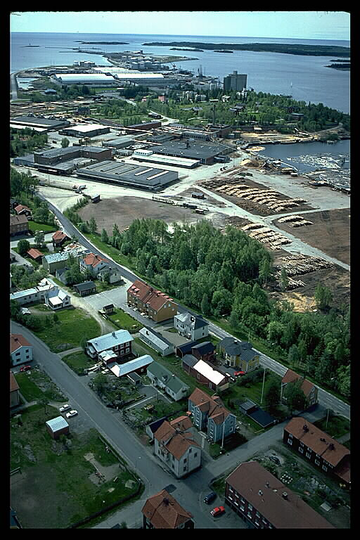 Bilden troligen från slutet av 1970-talet.; Miljöer; Sågverkssamhälle; Tätort